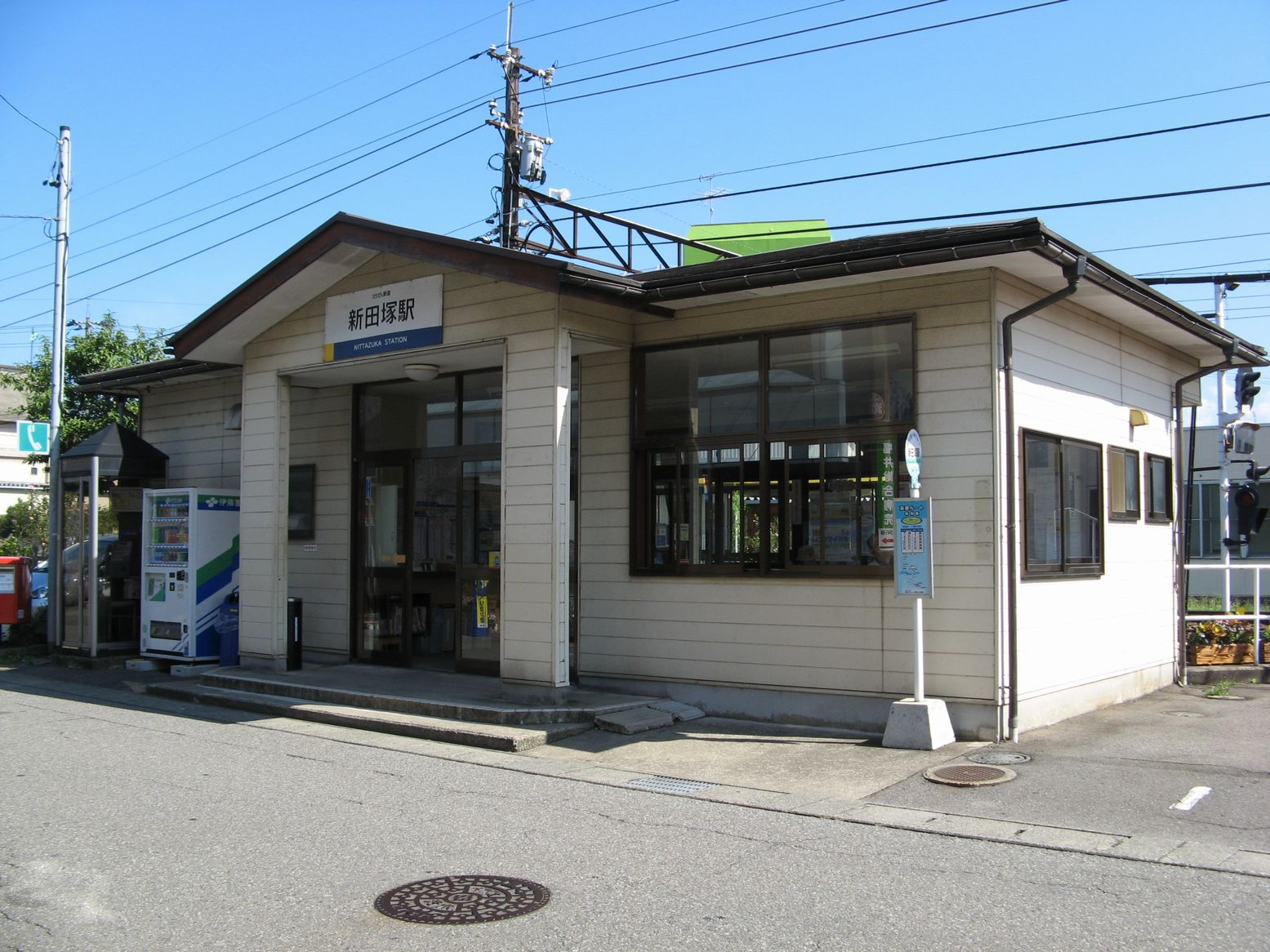 新田塚駅 駅舎